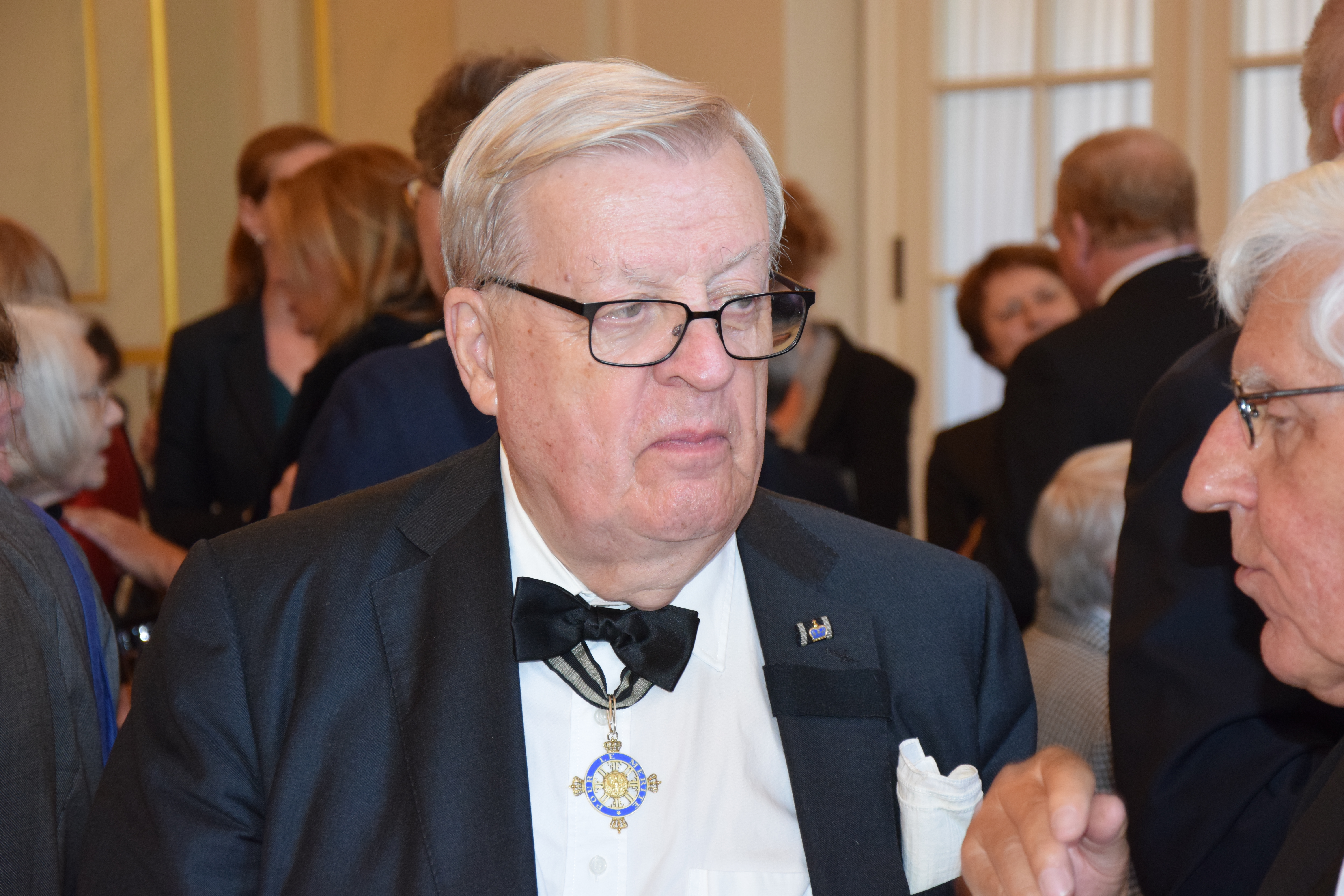 Öffentliche Sitzung der Mitglieder des Ordens Pour le mérite für Wissenschaften und Künste 2014 im Konzerthaus am Gendarmenmarkt in Berlin